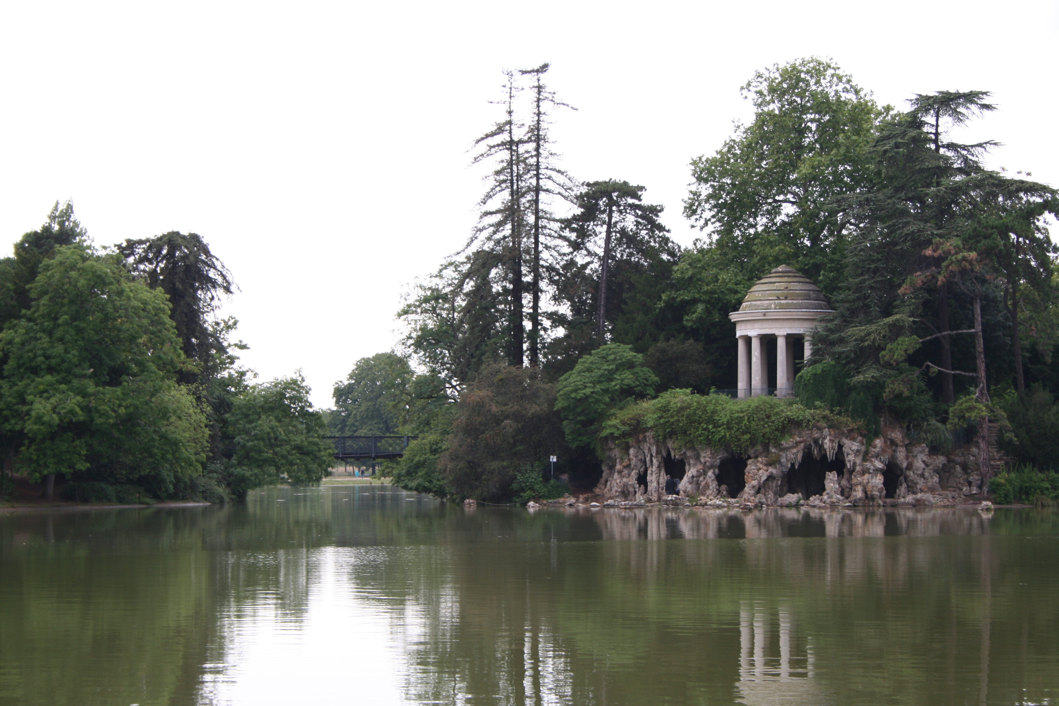 Bois de Vincennes, Paris, France. Le temple d'Amour est l'œuvre de Gabriel Davioud en 1860